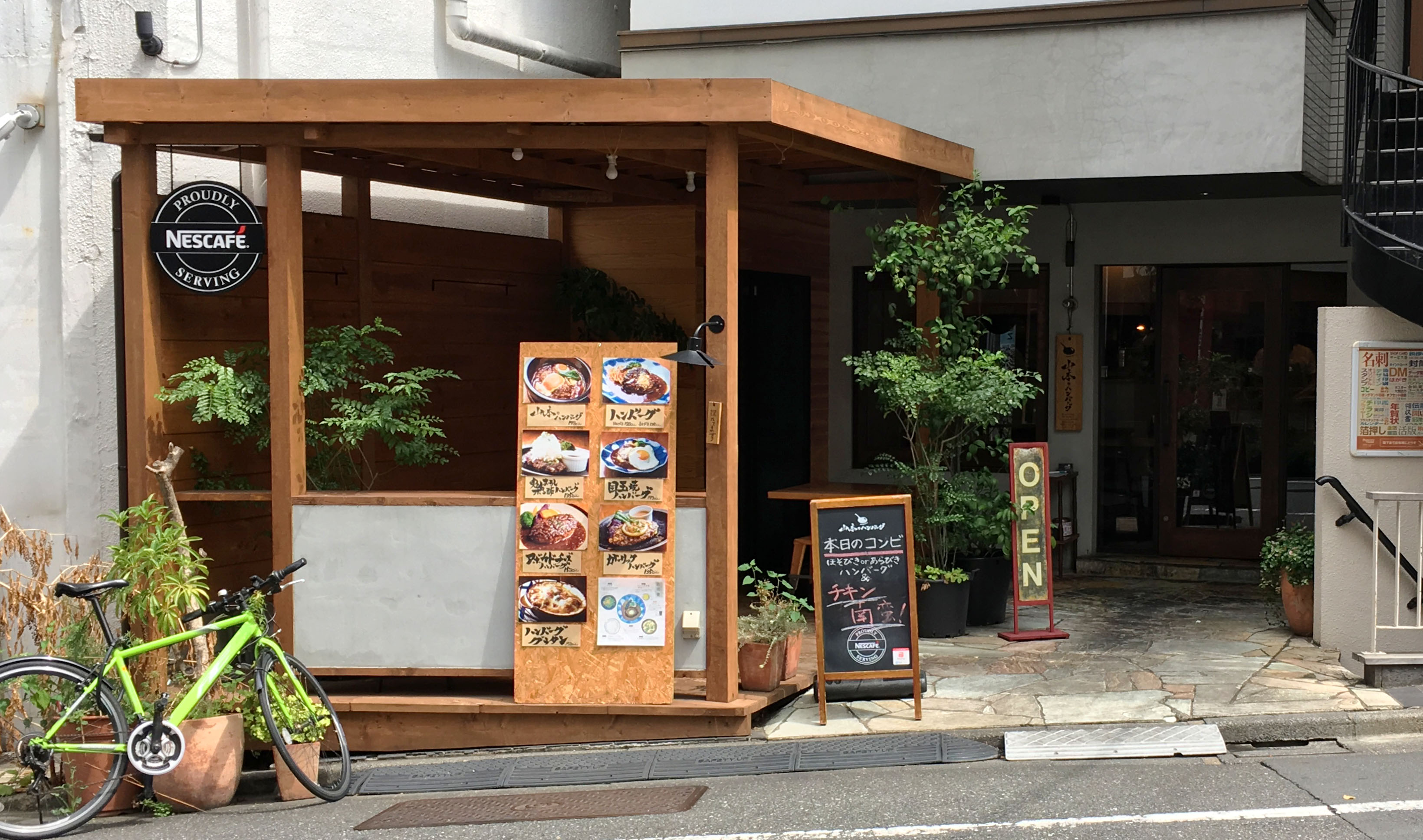 山本のハンバーグ 恵比寿本店